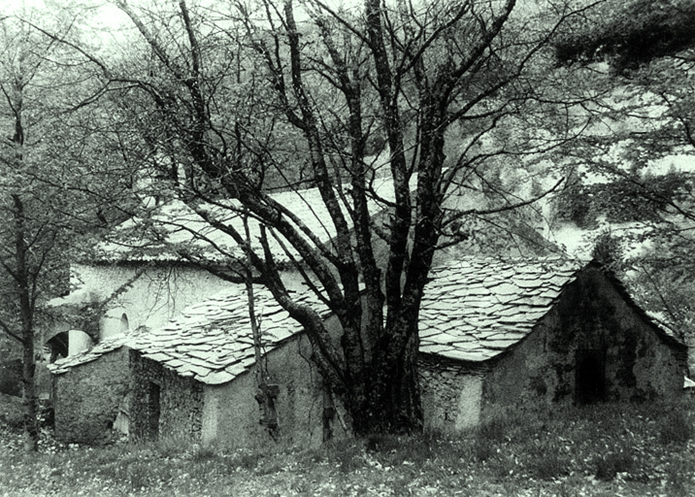 Vue d'ensemble de l'abbaye de Notre-Dame de Lure